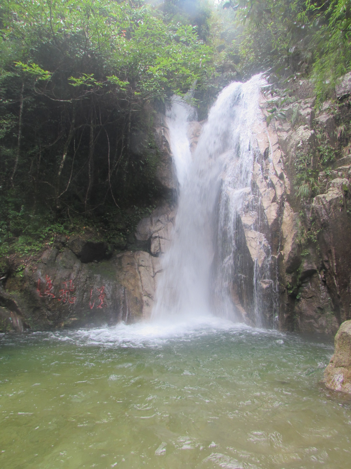 雙飛瀑位於南嶺國家森林公園的瀑布群。